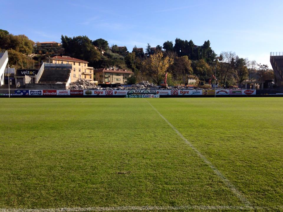 Foto scattata il 7 dicembre, da cui si può vedere come gran parte della tribuna EST sia stata demolita